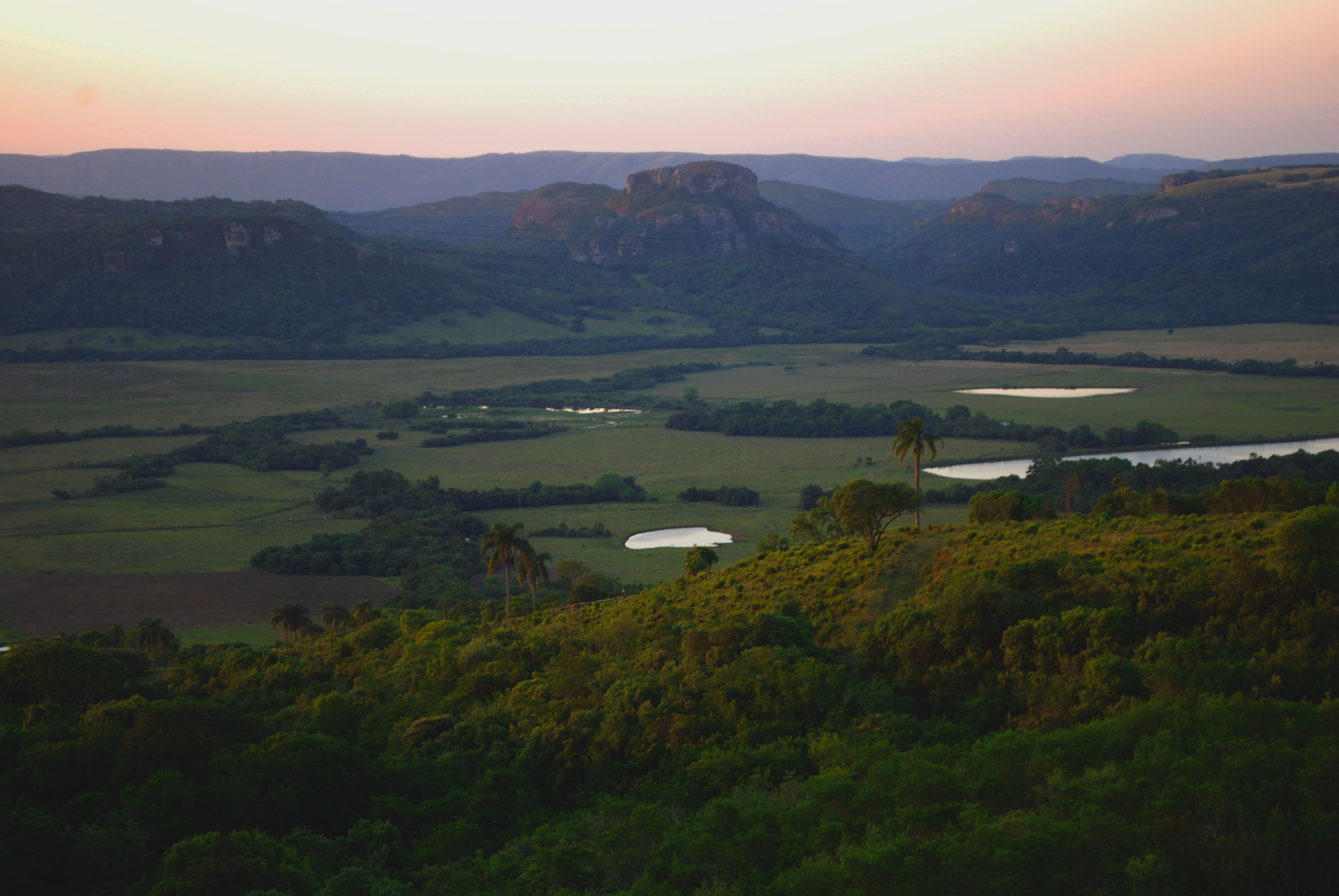 Vale do Santa Barbara - Caçapava do Sul